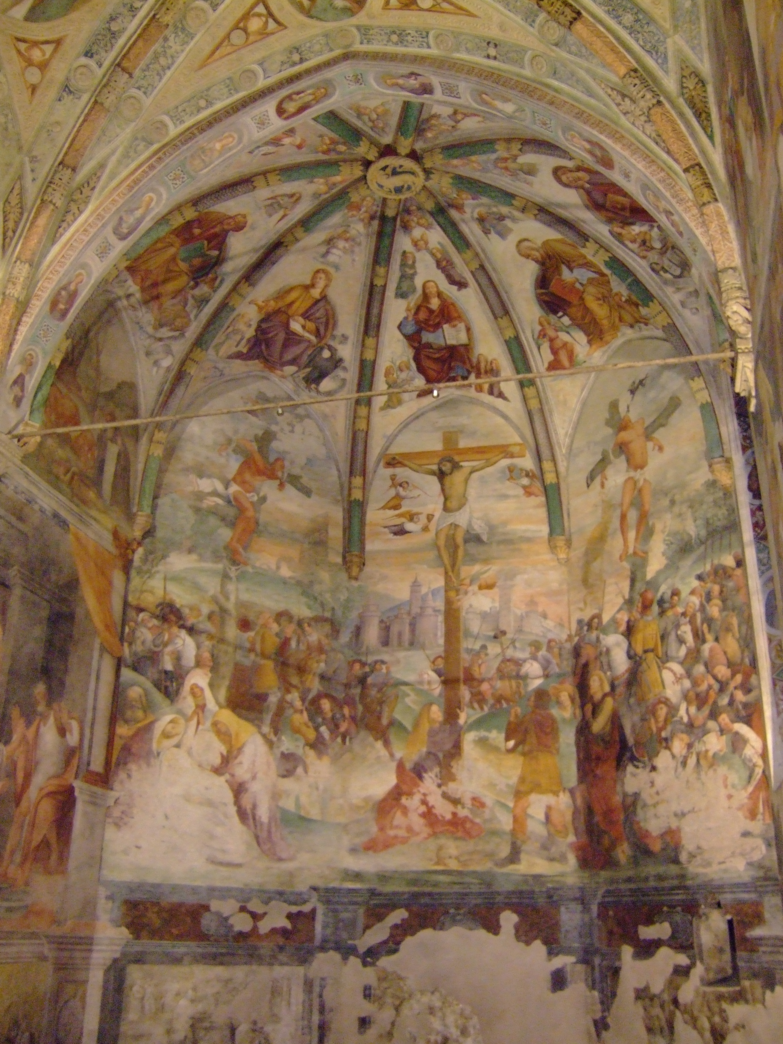 Crucifixion